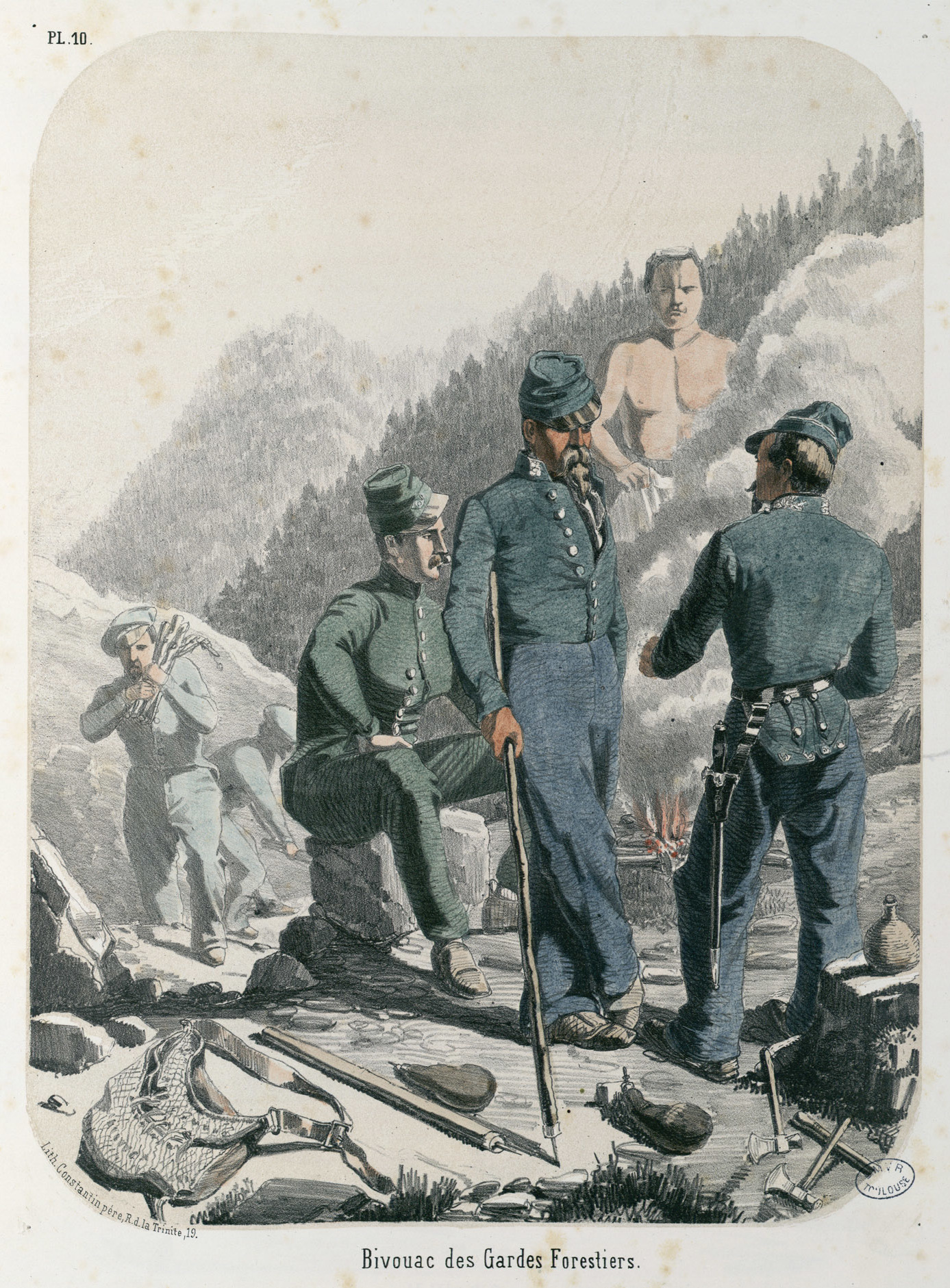 Album de 12 lithographies en couleurs (aquarellées) Cartonnage d'éditeur, titre lithographié avec vignette Bon état (foxing important, visible surtout dans les marges) Ancely, René (1876 - 1966). Possesseur